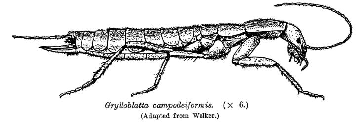 Grylloblatta campodeiformis, a grylloblattid